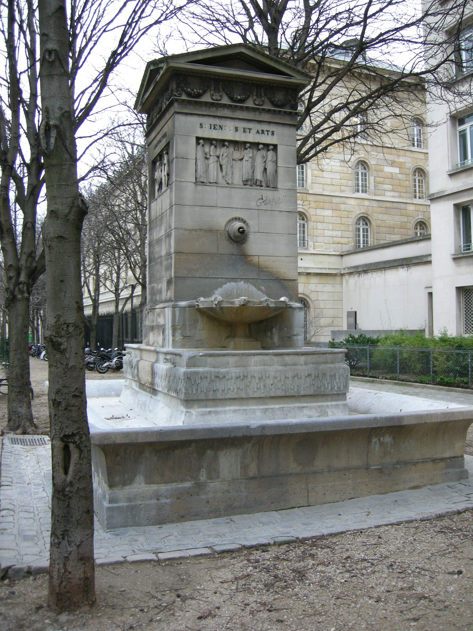 Fontana di rue bonaparte